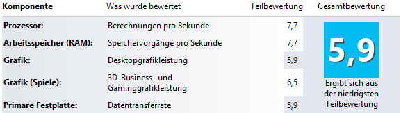 Screenshot des Windows-Leistungsindex unter Windows 8.